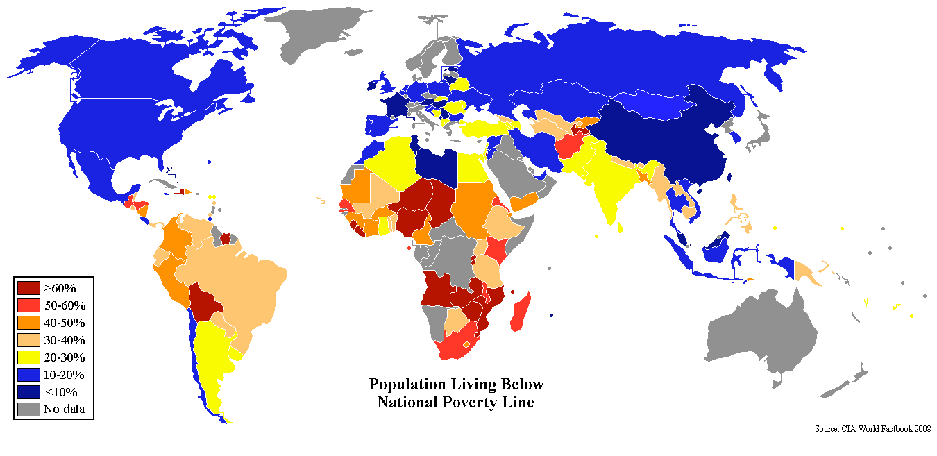 kaart armoedegrens